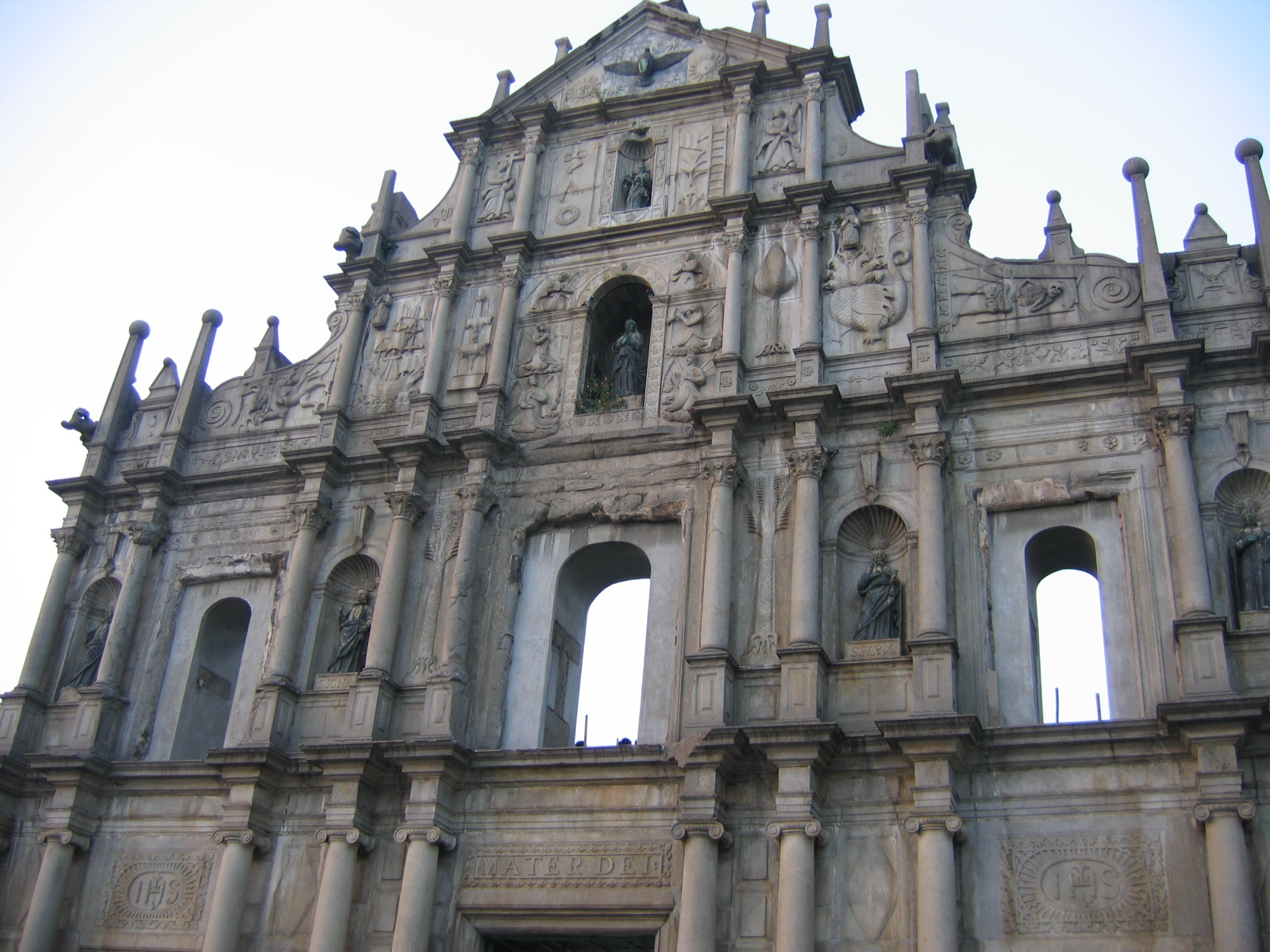 Fasáda kostela v Macau, Čínská lidová republika